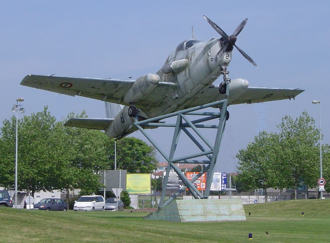 Avion (Breguet Alize) situé sur rond-point Albert Bignon à Rochefort (17), permettant l'accès au Musée de laéronautique navale.